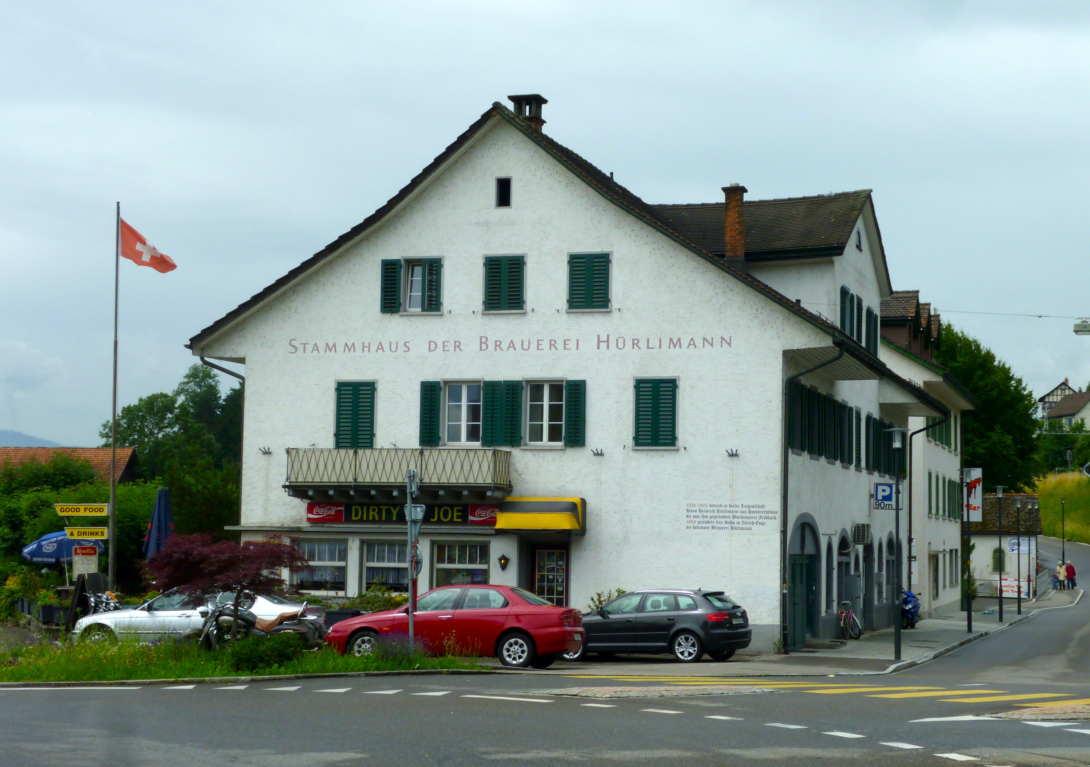 Gründungshaus derde:Brauerei Hürlimann in Feldbach (Hombrechtikon)